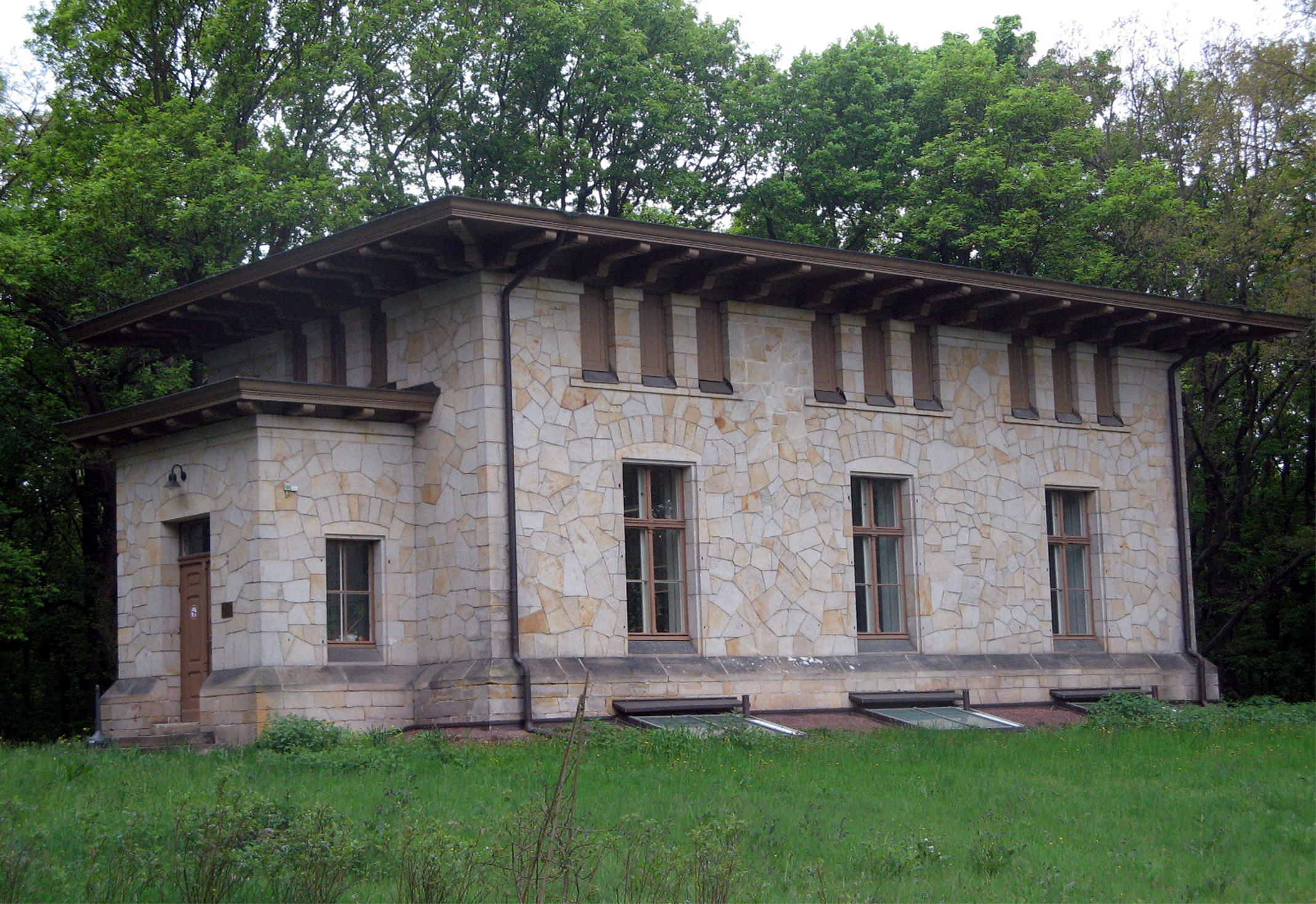 Das 1888 errichtete magnetische Variationshaus gehörte zum Geomagnetischen Observatorium Potsdam, das der Geophysiker Adolf Schmit 1902 bis 1928 leitete. Beim Bau wurde auf eisenhaltige Baustoffe wie Nägel, Ziegelsteine und Zement verzichtet. Die Sandsteinblöcke (Wefenslebener Sandstein) greifen ineinander. Bindemittel ist Rüdersdorfer Kalk. Heute wird hier im Wissenschaftspark Albert Einstein der Paläomagnetismus untersucht.